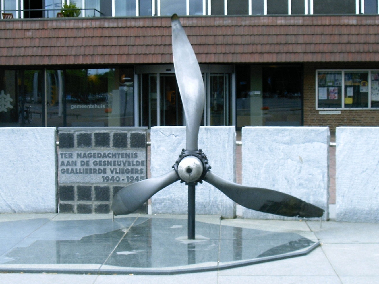 Vliegersmonument in Dronten gezien vanaf voorkant.